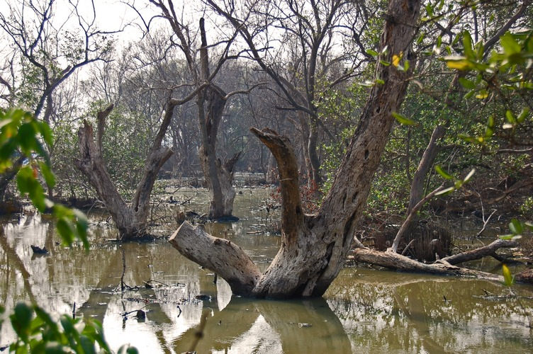 Mangrove at Muara Angke, Jakarta, Indonesia